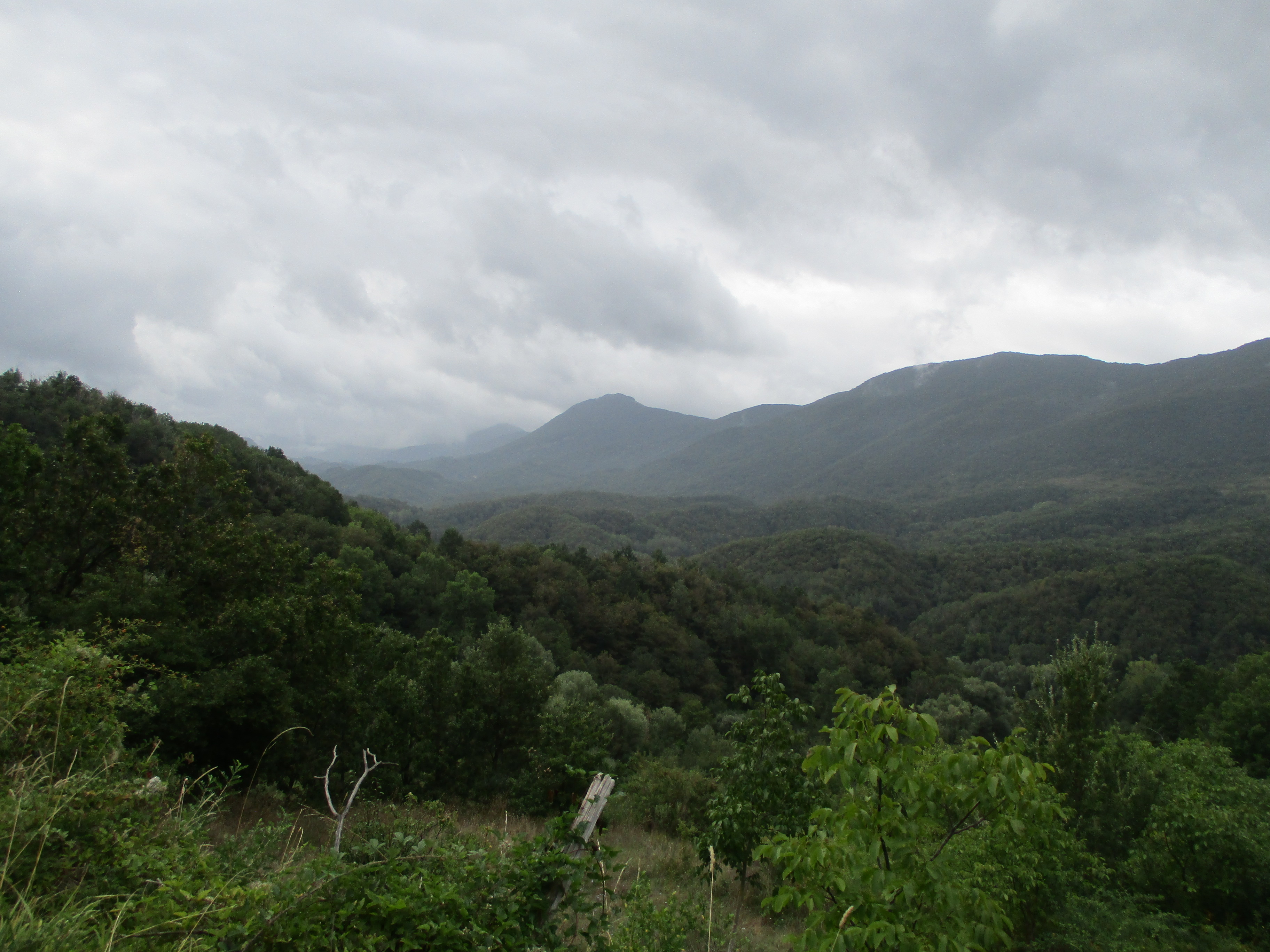 La valle del Fucero